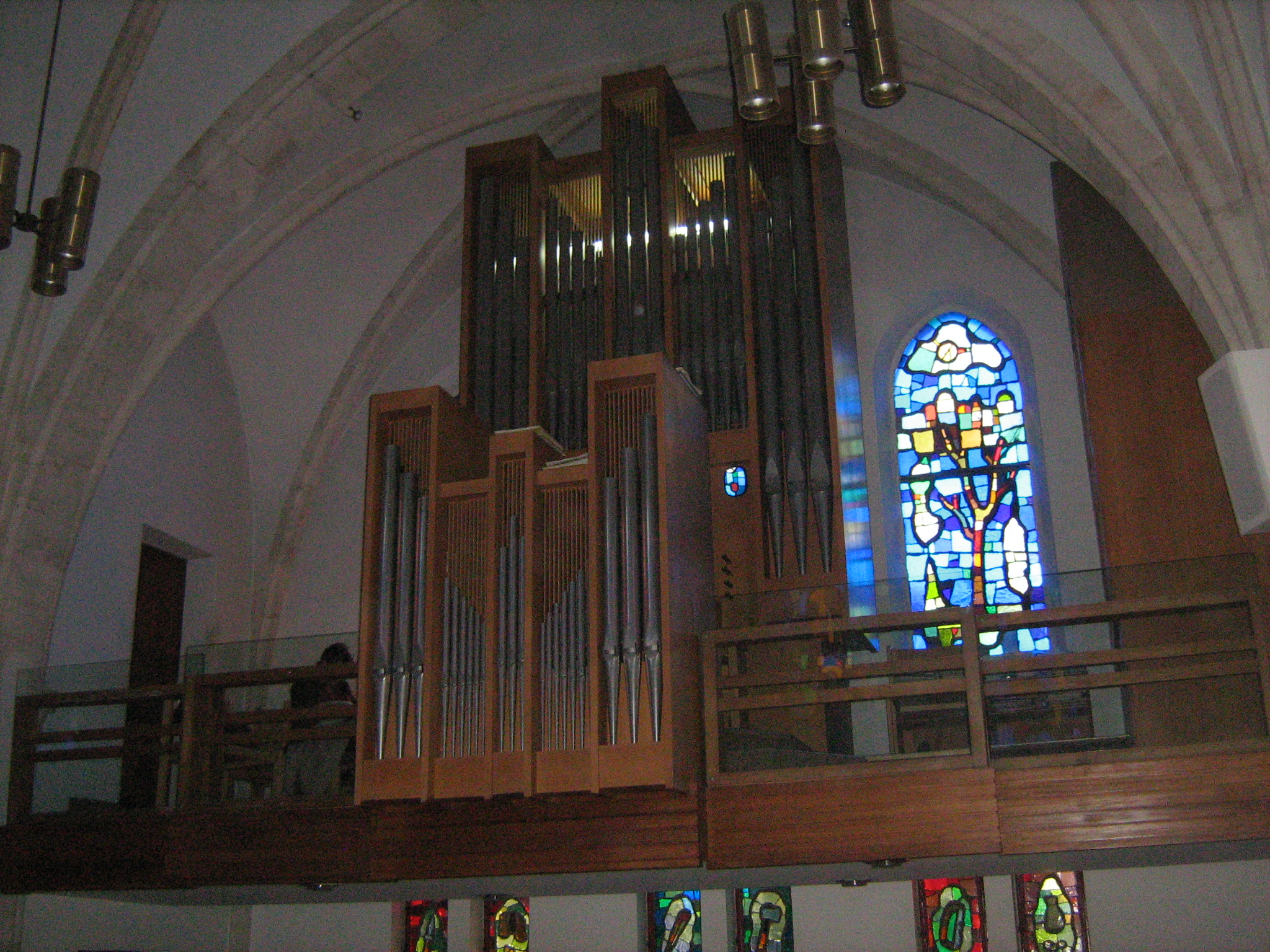 המושבה האמריקאית ביפו